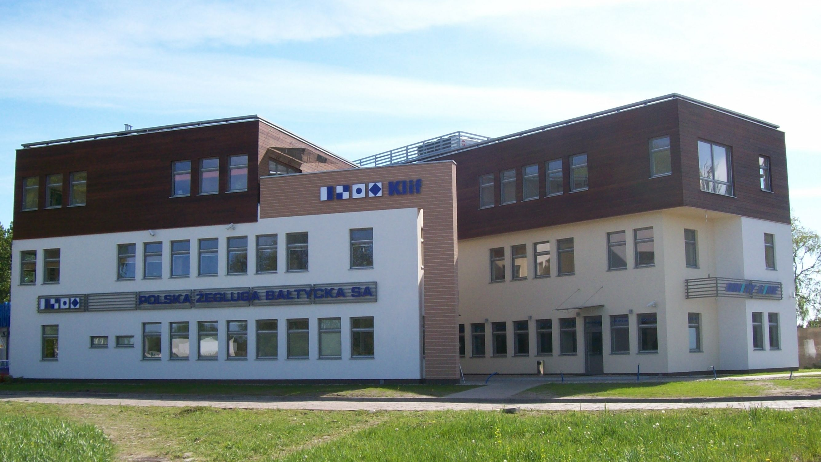 Centrum Obsługi Klientów Promowych KLIF.